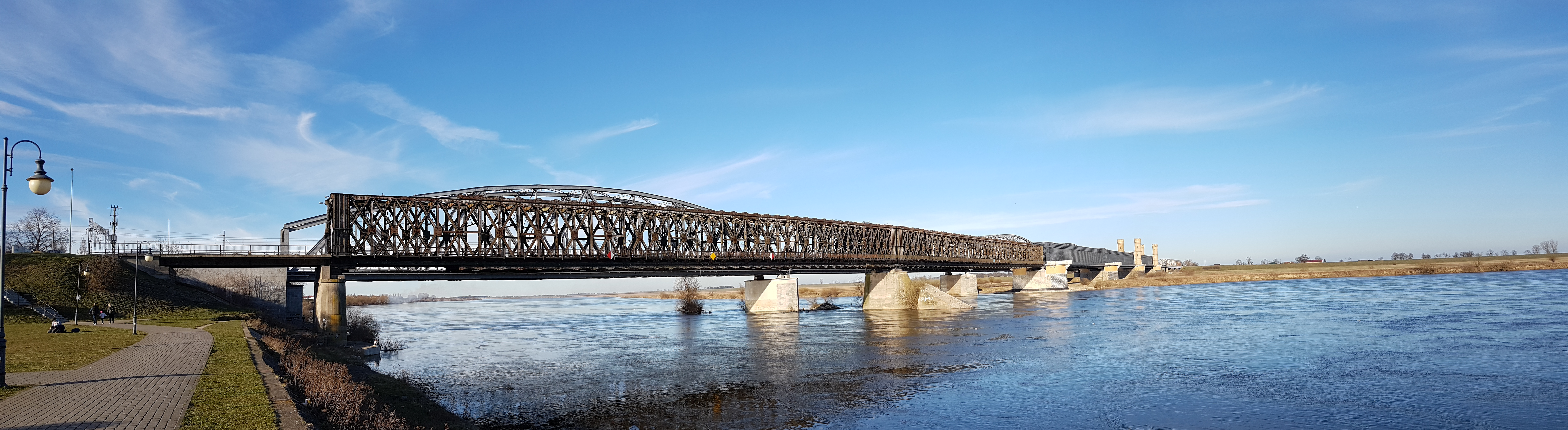 Widok na most od strony Tczewa